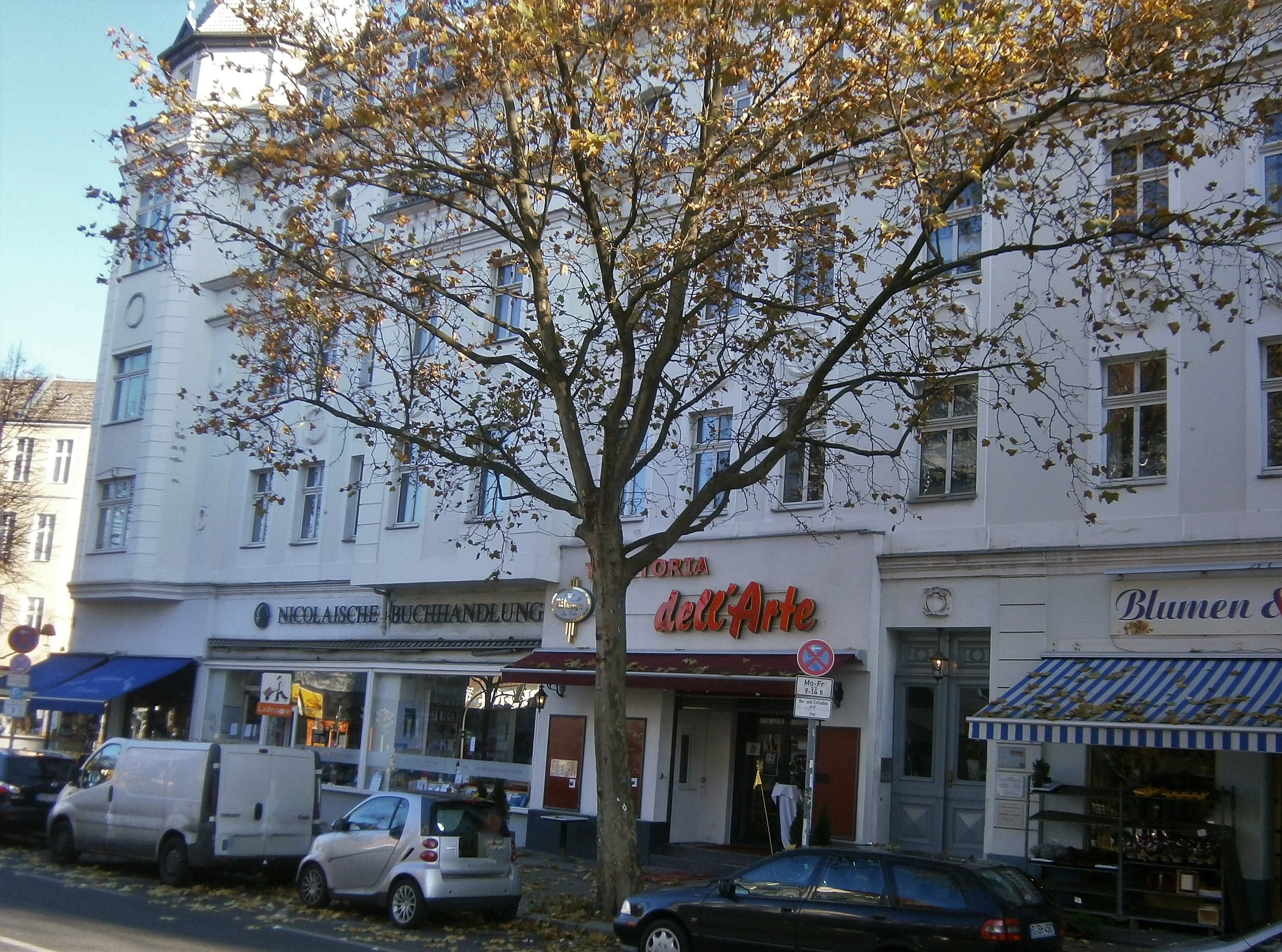 Die Rheinstraße ist eine Berliner Straße im Bezirk Tempelhof-Schöneberg, Ortsteil Friedenau. Im Haus 65 befand sich 1907-1969 das Kino Rheinschloß-Filmtheater. Im Bild Straßenansicht und vormaliger Kinozugang.